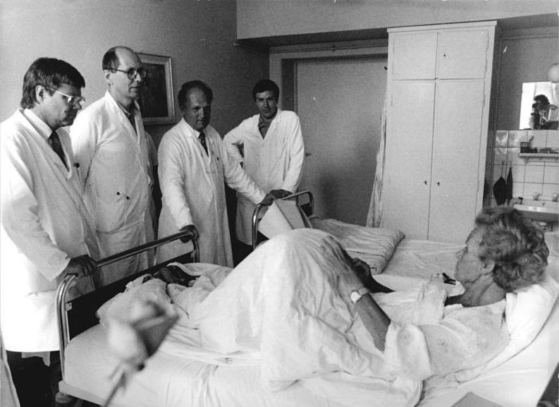 Rostock, Klinik für Innere Medizin, Arztvisite ADN-ZB Sindermann 9.8.88 Rostock: Krankenhausbehandlung. Die medizinische Betreuung an der Klinik für Innere Medizin (KIM) der Wilhelm-Pieck-Universität erfolgt in hoher Qualität und Wirksamkeit. OMR Prof. Dr. sc. med. Dr. h. c. mult. Horst Klinkmann (2.v.r.), Direktor dieser Klinik, leitet, koordiniert und kontrolliert die daignostische, therapeutische und pflegerische Arbeit. Das abgestimmte Zusammenwirken berät er mit den Leitern von zehn Abteilungen. Dem dienen auch regelmäßige Visiten mit ihm und Dozent Dr. Sc. med. Diplom-Physiker Dieter Falkenhagen (links), Dr. Eberhard Schmitt (2.v.l.) und Stationsarzt Dr. Wolfgang Ramlow (rechts). Prof. Klinkmann ist Präsident des Rates für Medizinische Wissenschaften der DDR, Leiter der Hauptforschungsrichtung "Künstlicher Organersatz und Biomaterialien" der Republik und gleichzeitig Präsident der Europäischen Gesellschaft für Dialyse und Transplantation und der Europäischen Gesellschaft für Künstliche Organe.